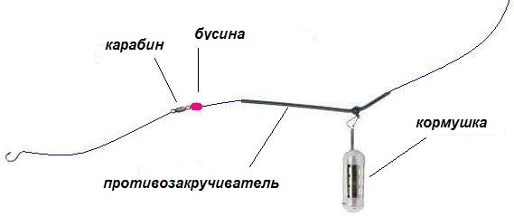 Legering